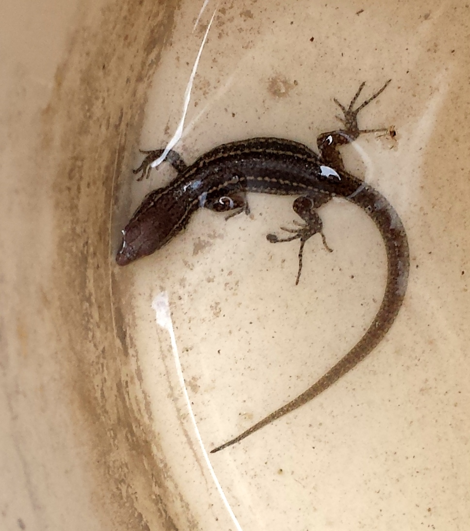 Psammodromus hispanicus, sargantana cuallarga petita, de la Serra de Castelltallat, Bages